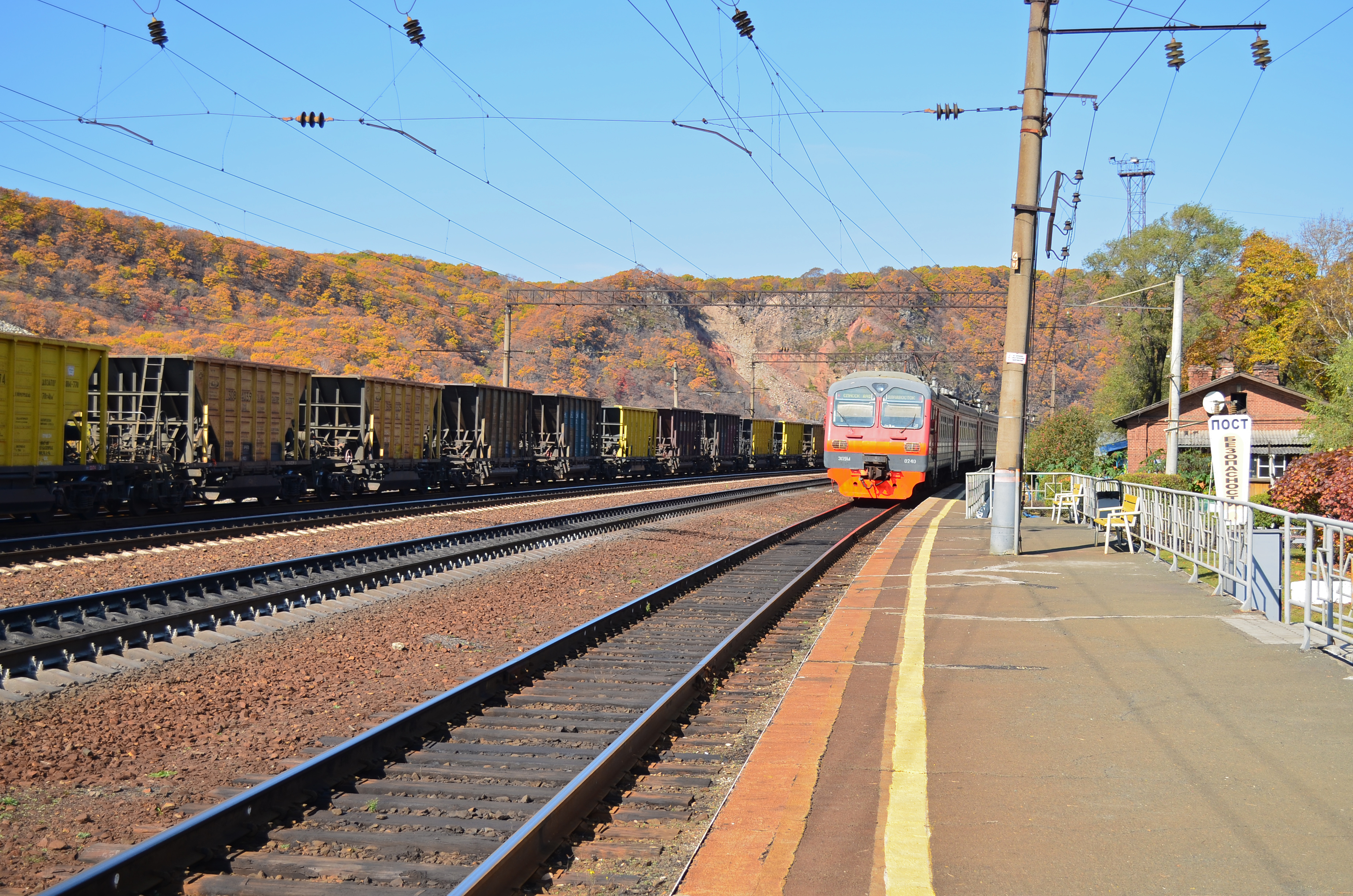 Электропоезд ЭД9М покидает станцию «Барановский». На заднем плане — потухший Барановский вулкан